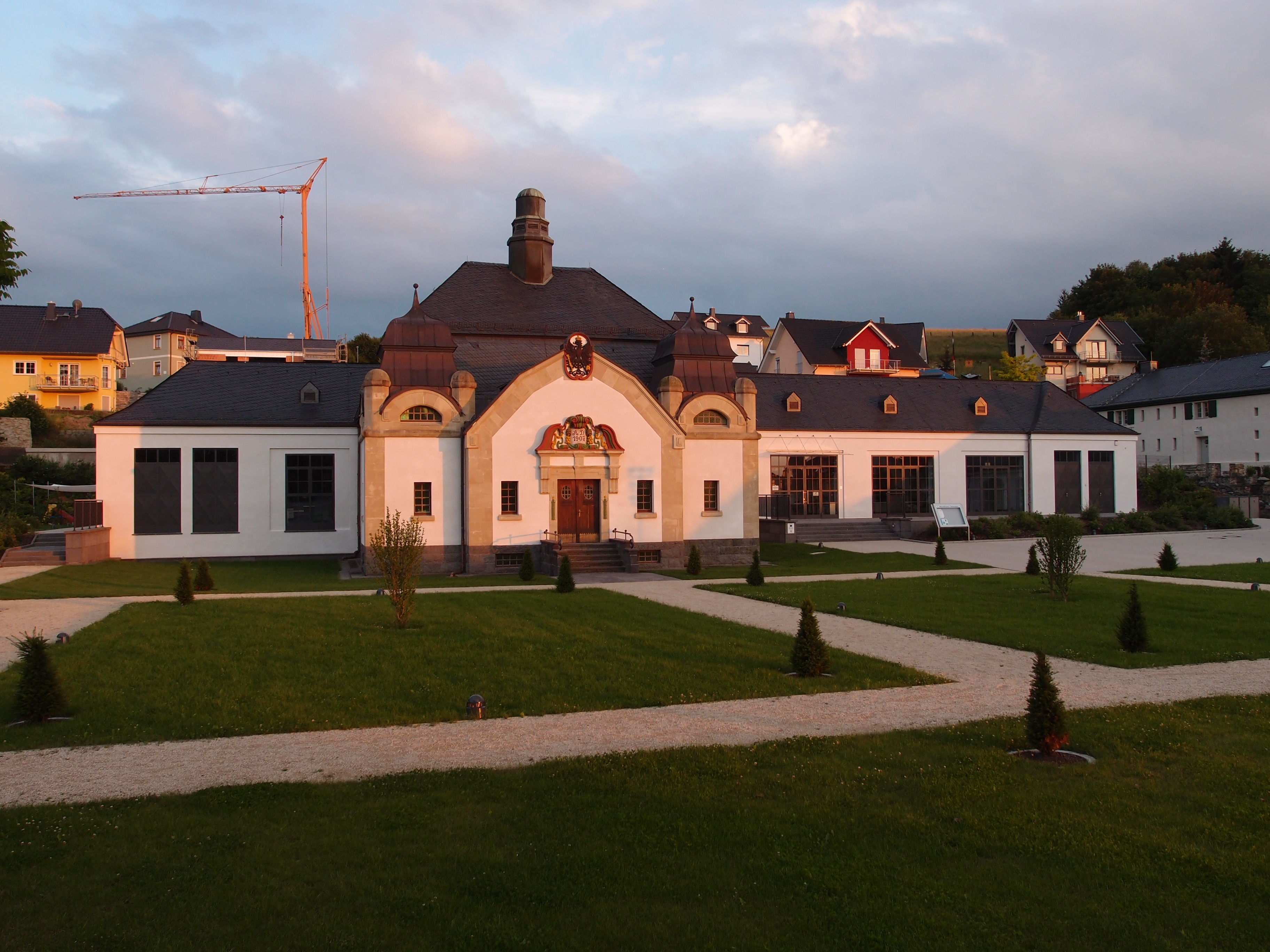 Brunnentempel des Mineralbrunnens in Selters (Taunus), Ortsteil Niederselters